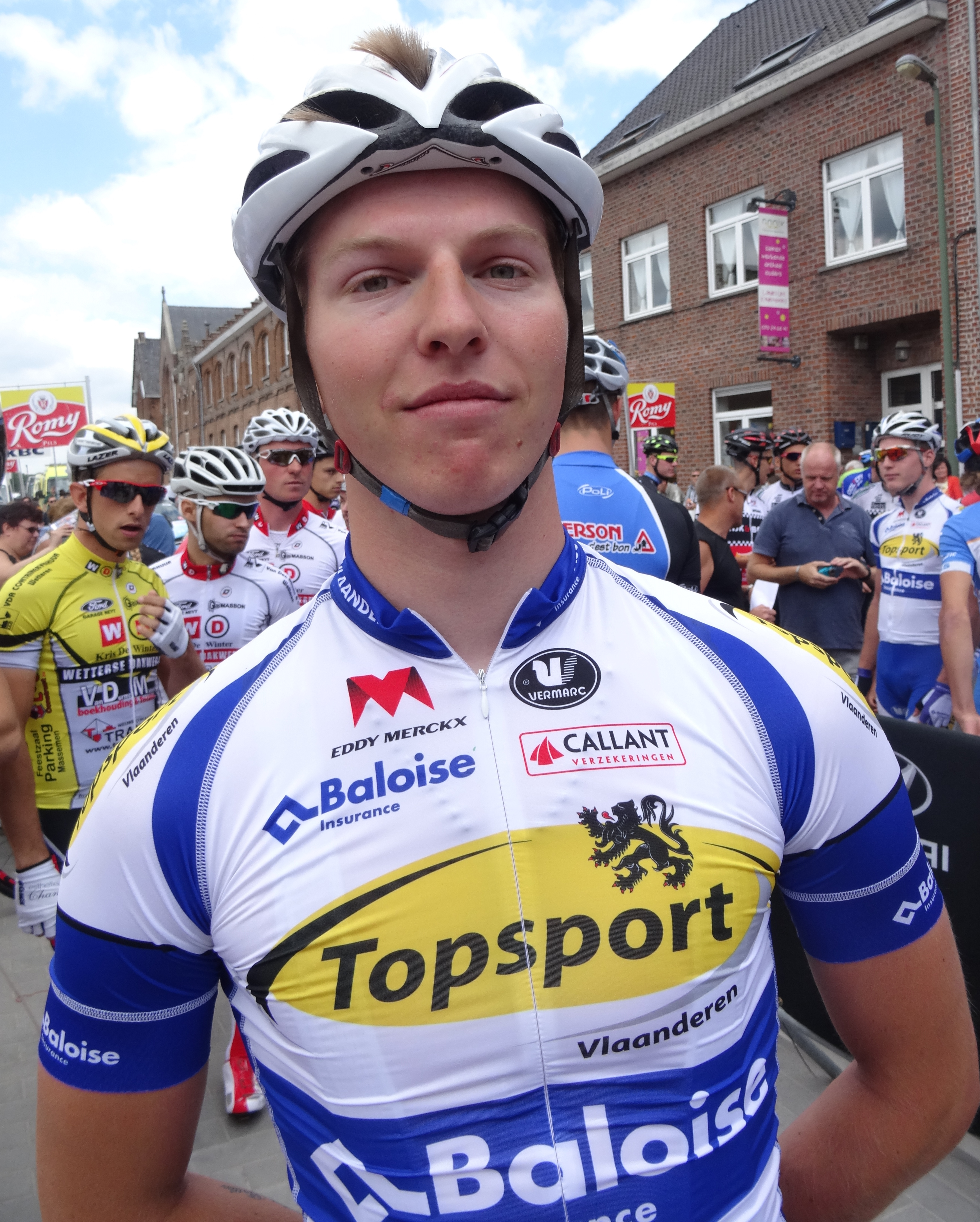 Reportage photographique réalisé le mercredi 25 juin à l'occasion du départ et de l'arrivée de l'Internationale Wielertrofee Jong Maar Moedig 2014 à Oetingen (Gooik), Belgique.